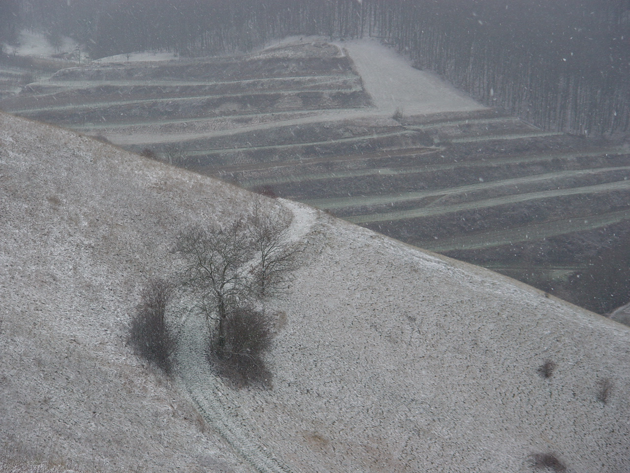 Badberge im Kaiserstuhl im Dezember